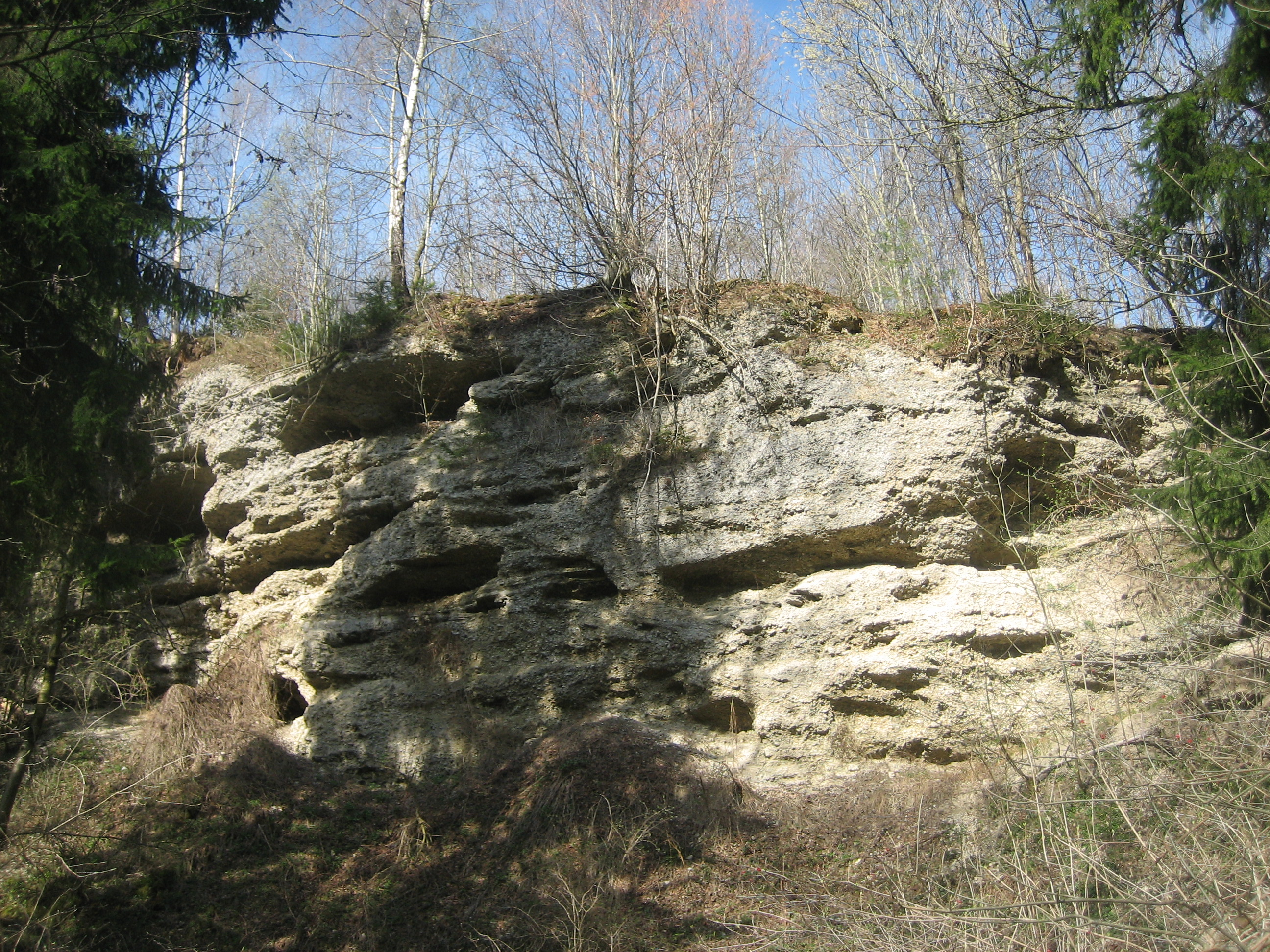 Geotop bei Waldegg, Bad Grönenbach, Landkreis Unterallgäu, Bayern